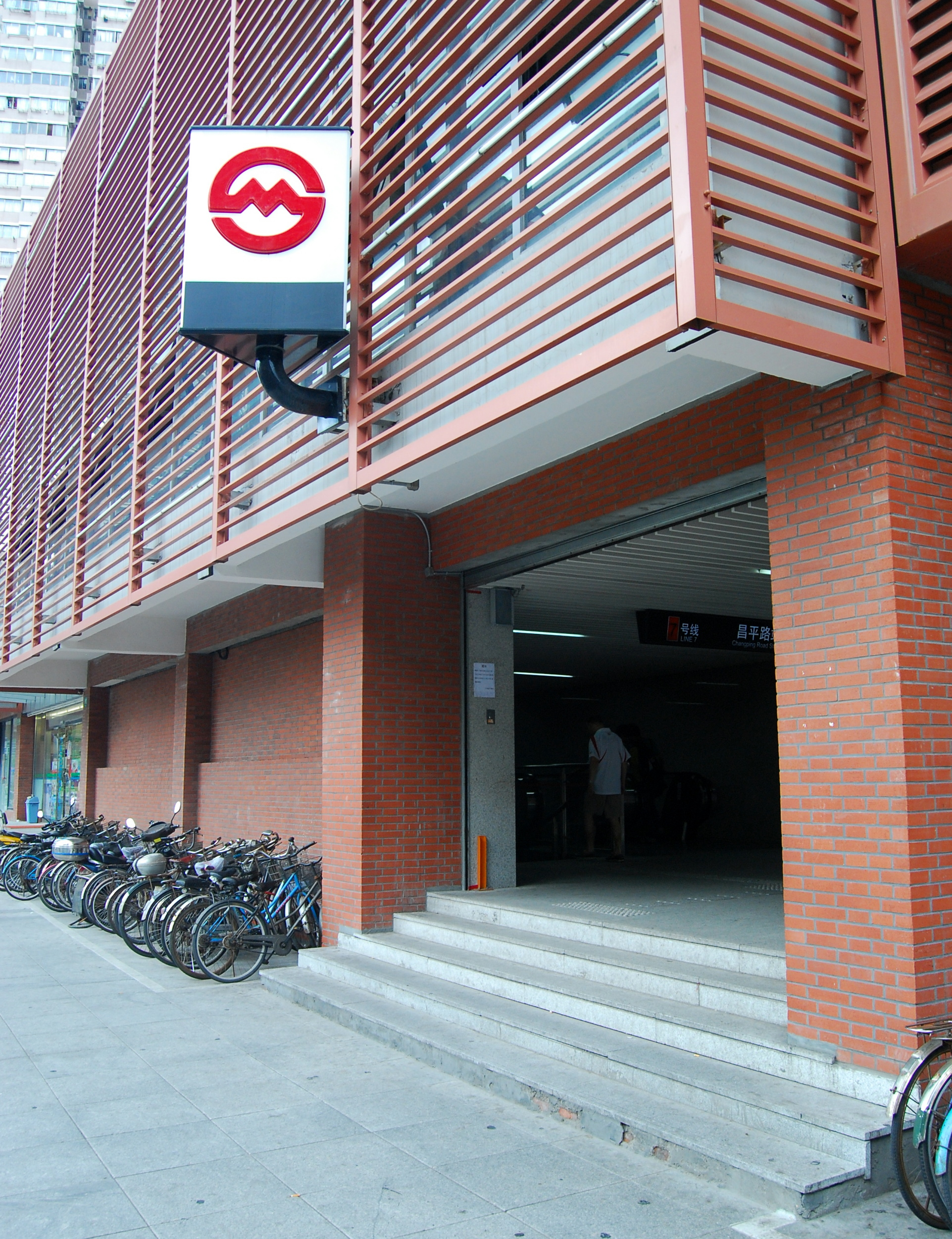 上海地铁昌平路站